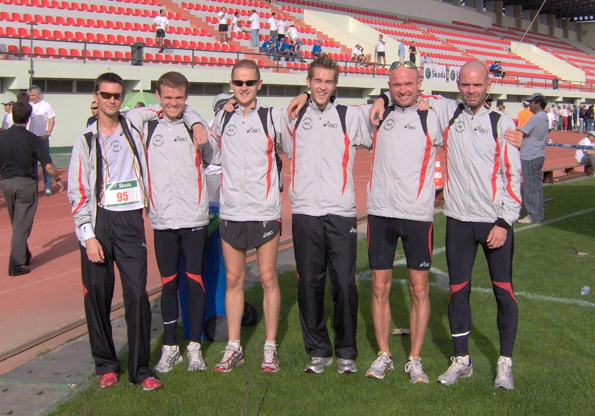 Herning Løbeklubs 6 udvalgte ved Europa Cuppen i Portugal. Fra venstre Leon Burke, Jeppe Farsøht, Søren Palshøj, Jesper Faurschou, Henrik Jensen, Hans Mygind.